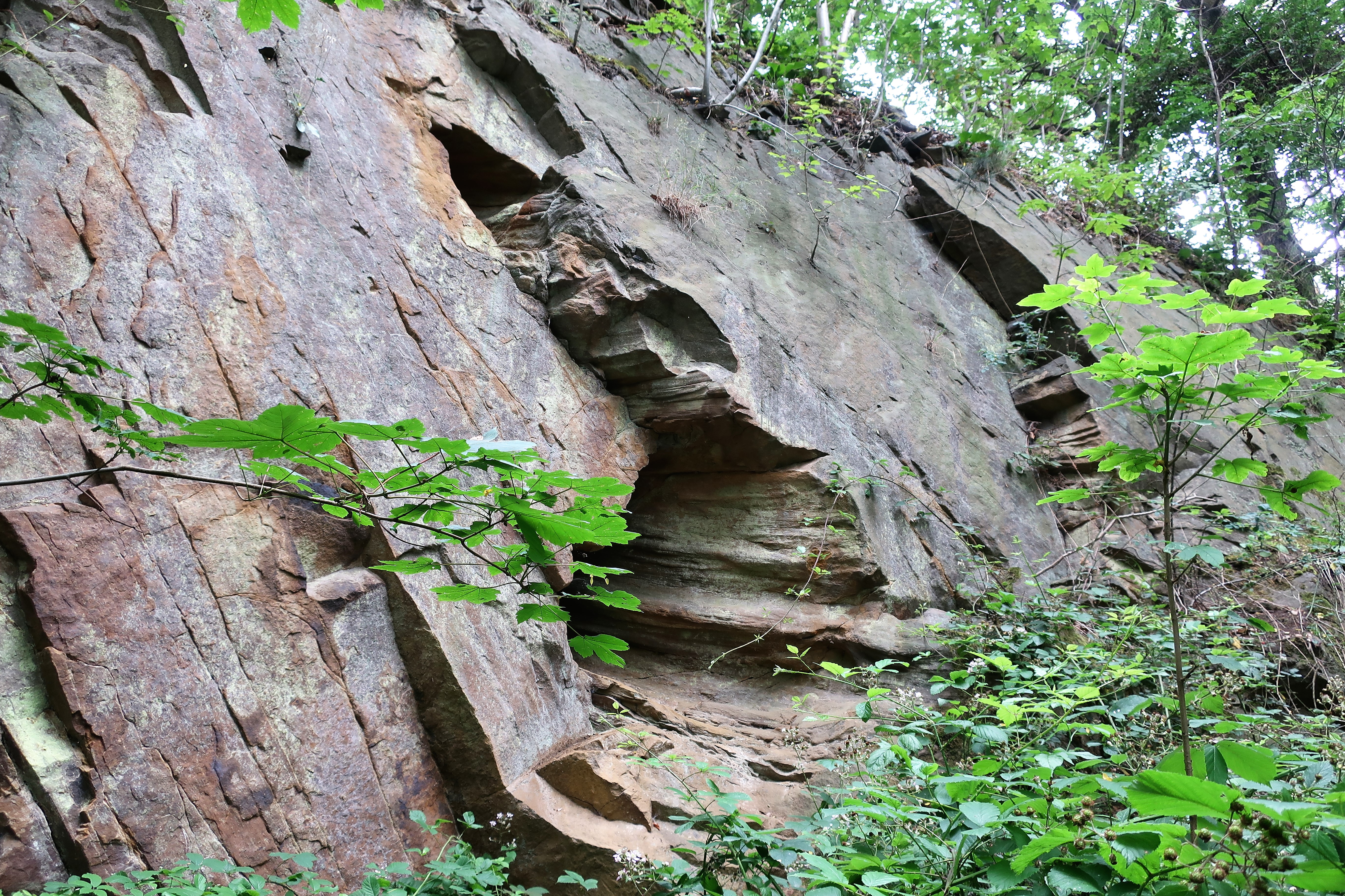 Geschützter Landschaftsbestandteil „Steinbrüche am Kaisberg“ in Hagen (Foto: fossiler Baumstamm (hohl) im Sandsteinfels).